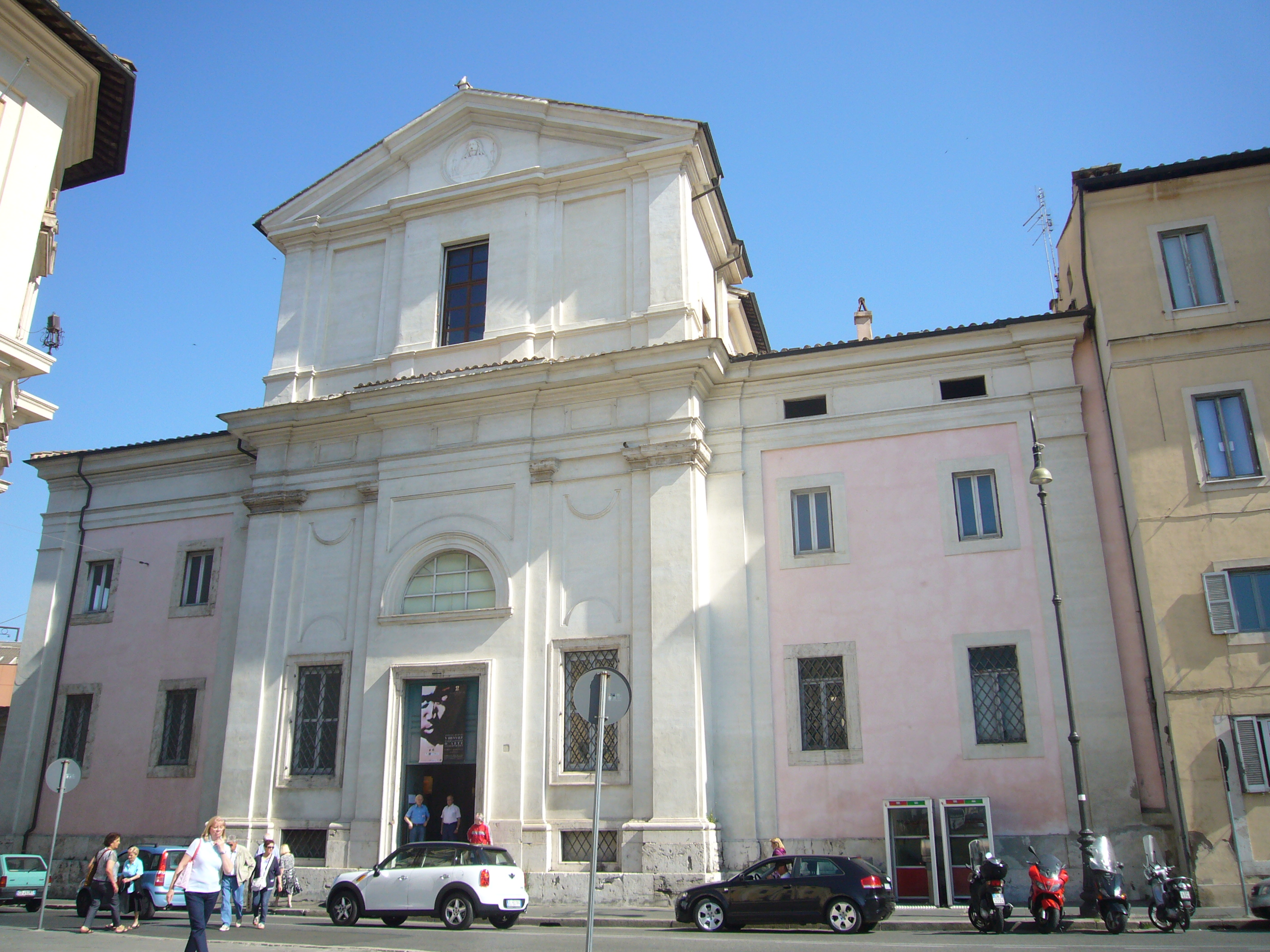 Roma, Ospedale delle donne al Laterano - facciata